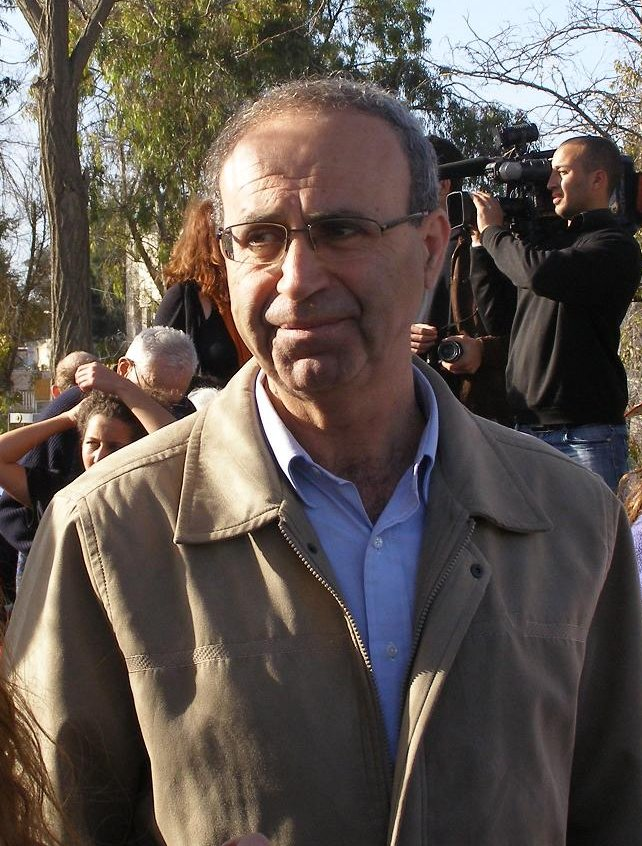 Израильский политик Хана Сауид